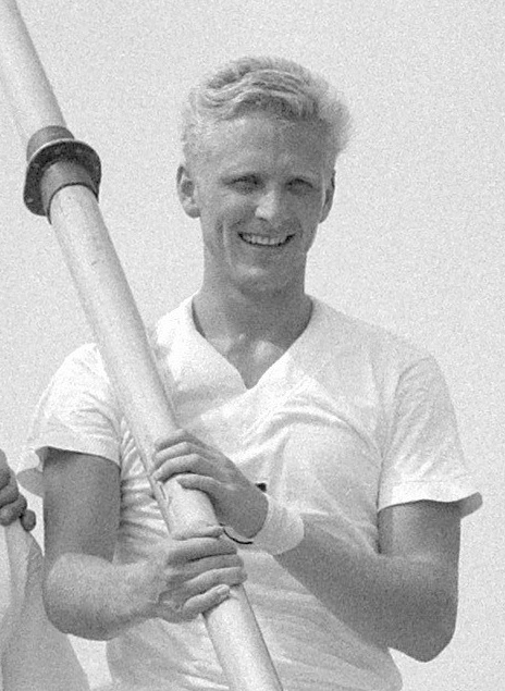 Europese roeikampioenschappen op de Bosbaan, Duitse twee met stuurman in actie